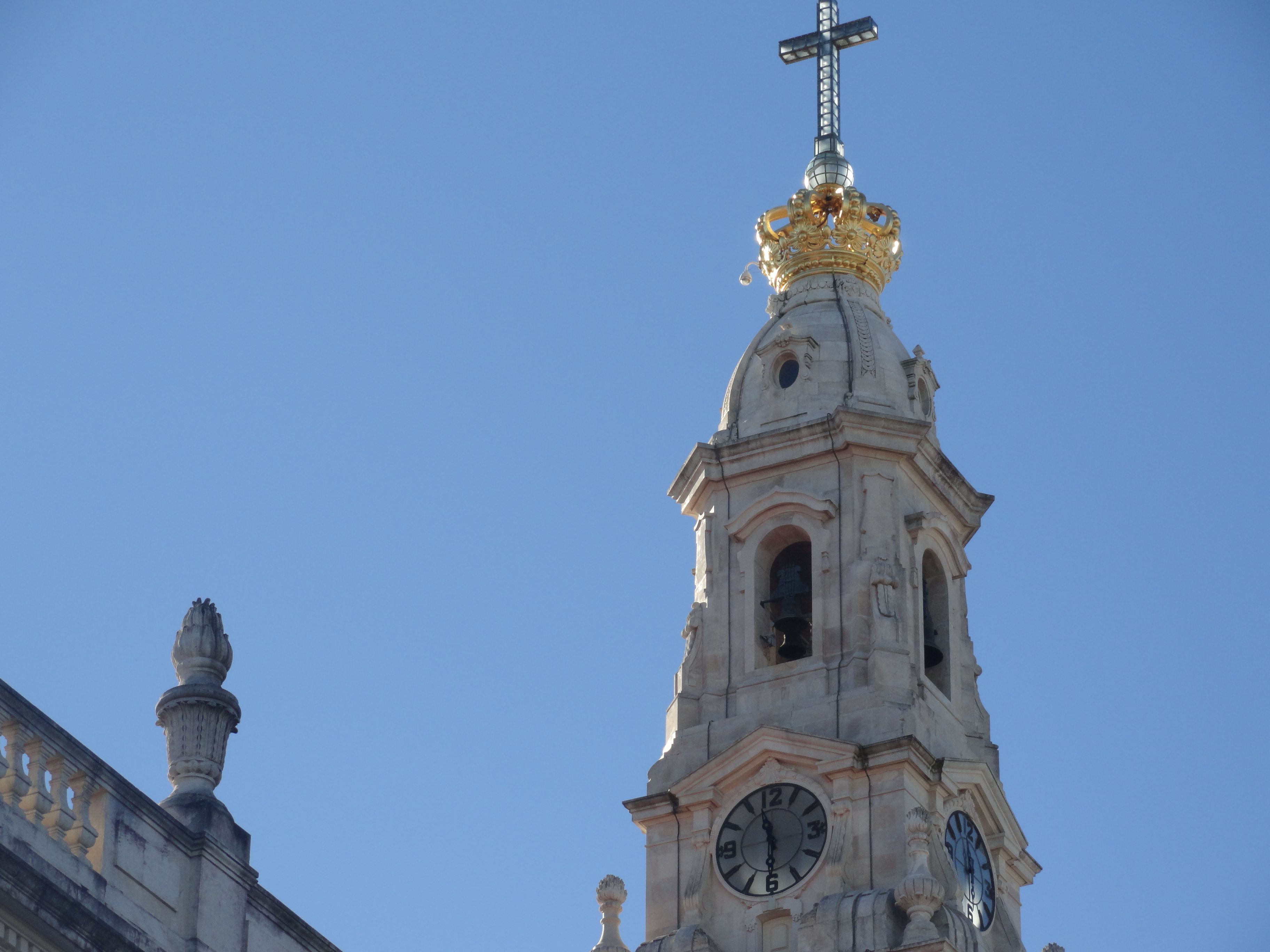 Clocher de la basilique Notre-Dame du Rosaire, surmontée d'une couronne de bronze et d'une croix.